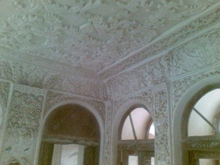 آینه بالا خانه